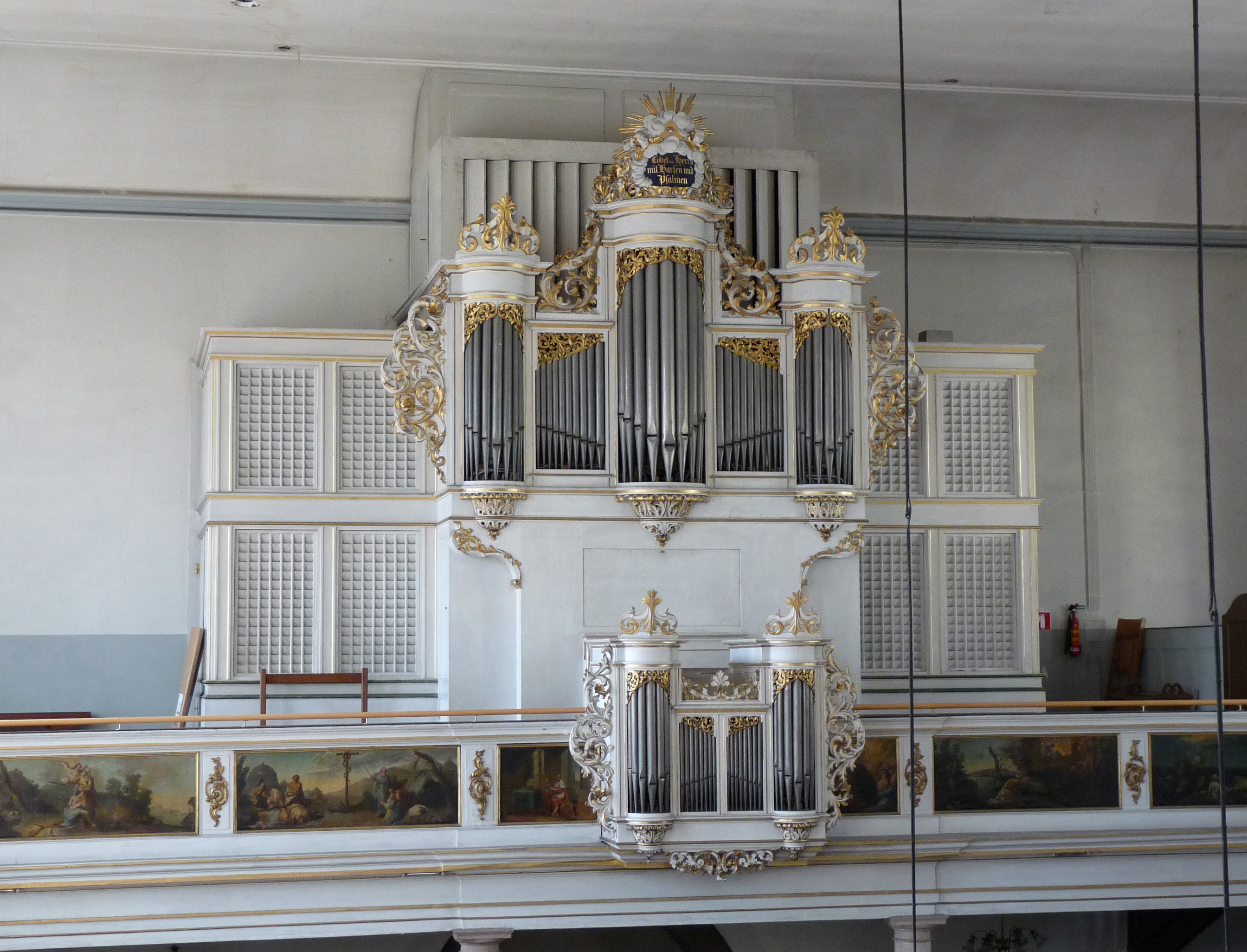 Eglise Sainte-Aurélie de Strasbourg : orgue réalisé par Andreas Silbermann en 1718, plusieurs fois remanié depuis (dont Ernest Muhleisen, 1952), buffet peint en blanc et or en 1790. Panneaux peints par Pierre Joseph Noël en 1767 (scènes de l'Ancien Testament)